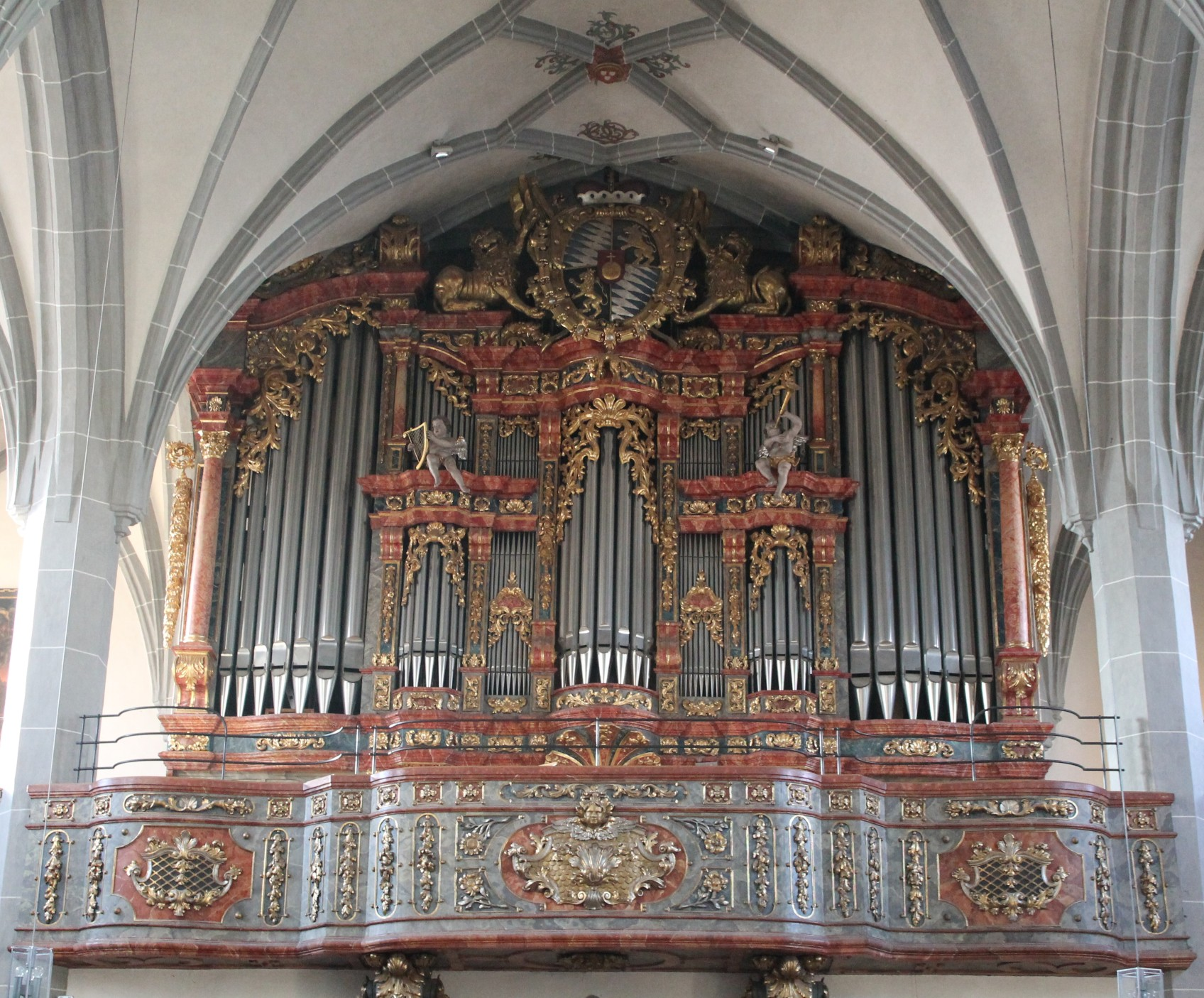 Orgel der Stiftspfarrkirche in Altötting